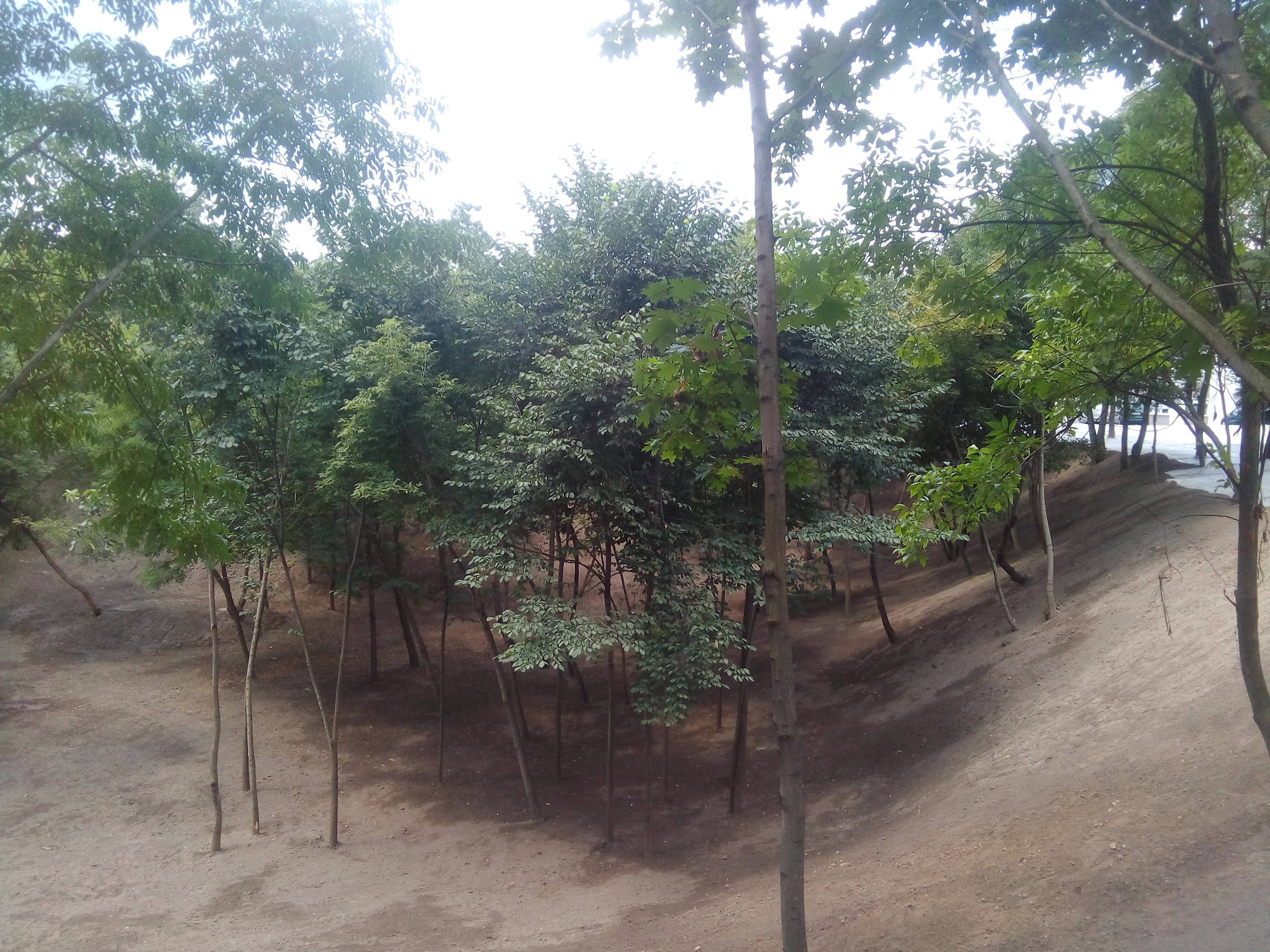 Схіл Кагальнага рову ў Гомелі. Стан у ліпені 2018 года.